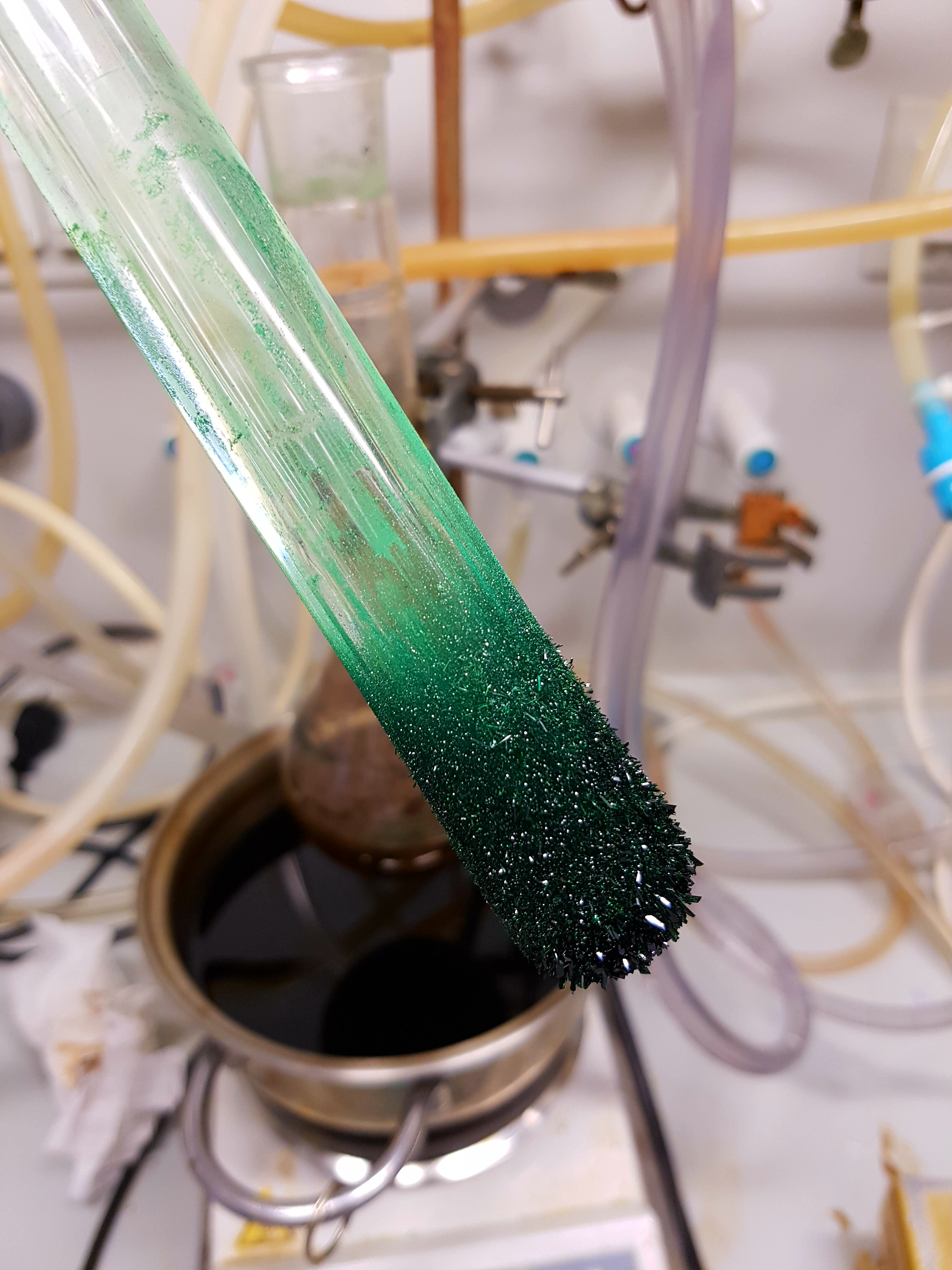 Nickelocen-Kristalle an einem Kühlfinger einer Sublimationsapparatur.